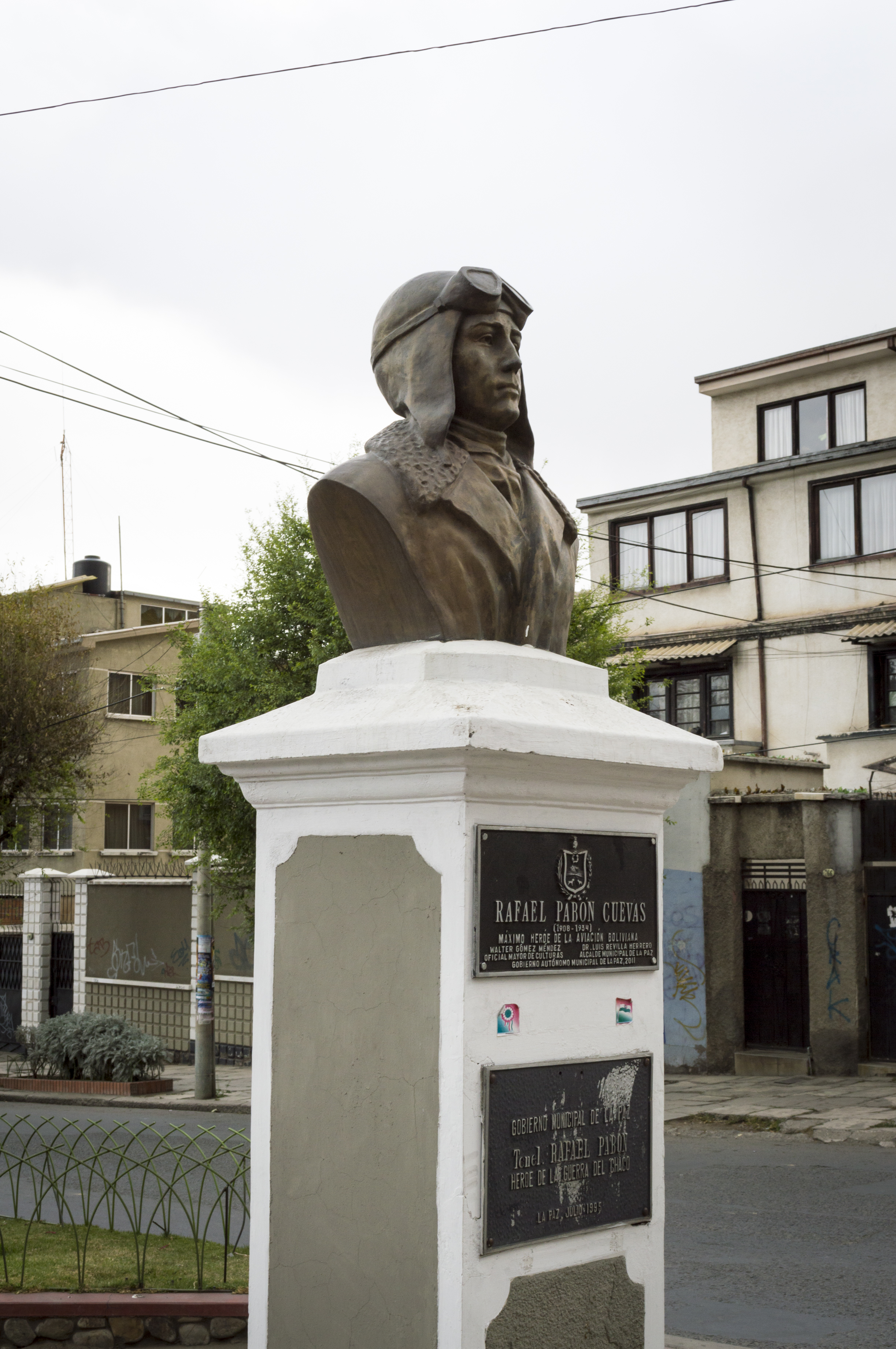 Rafael Pabón Av. Busch, La Paz - Bolivia This medium shows the protected monument with the number L/00-272 in Bolivia.